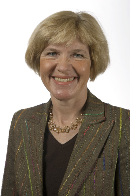 Borghild Tenden, Stortingsrepresentant (V) fra Akershus.